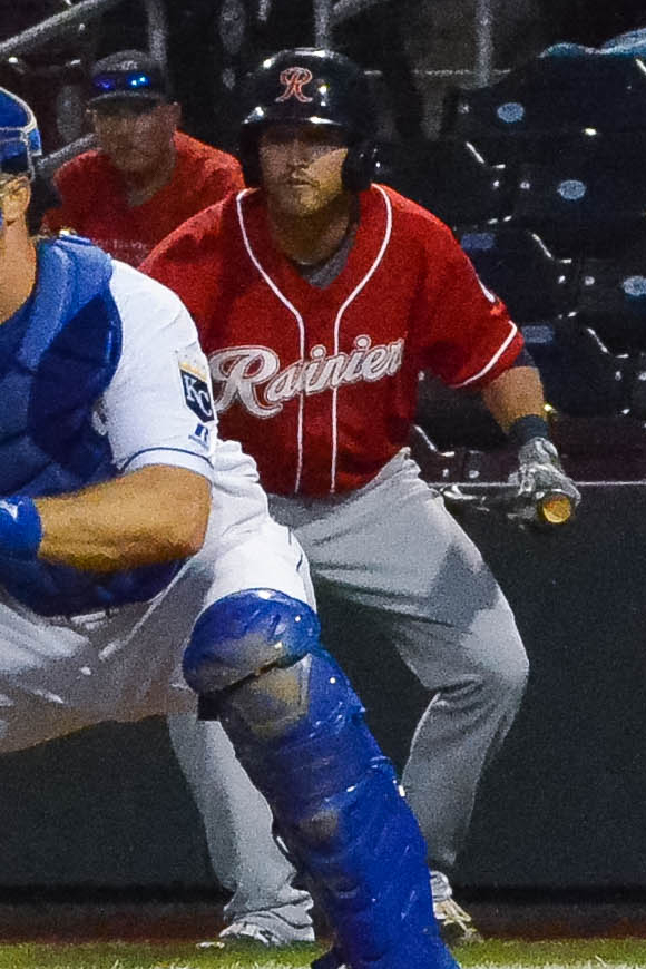 Shawn O'Malley